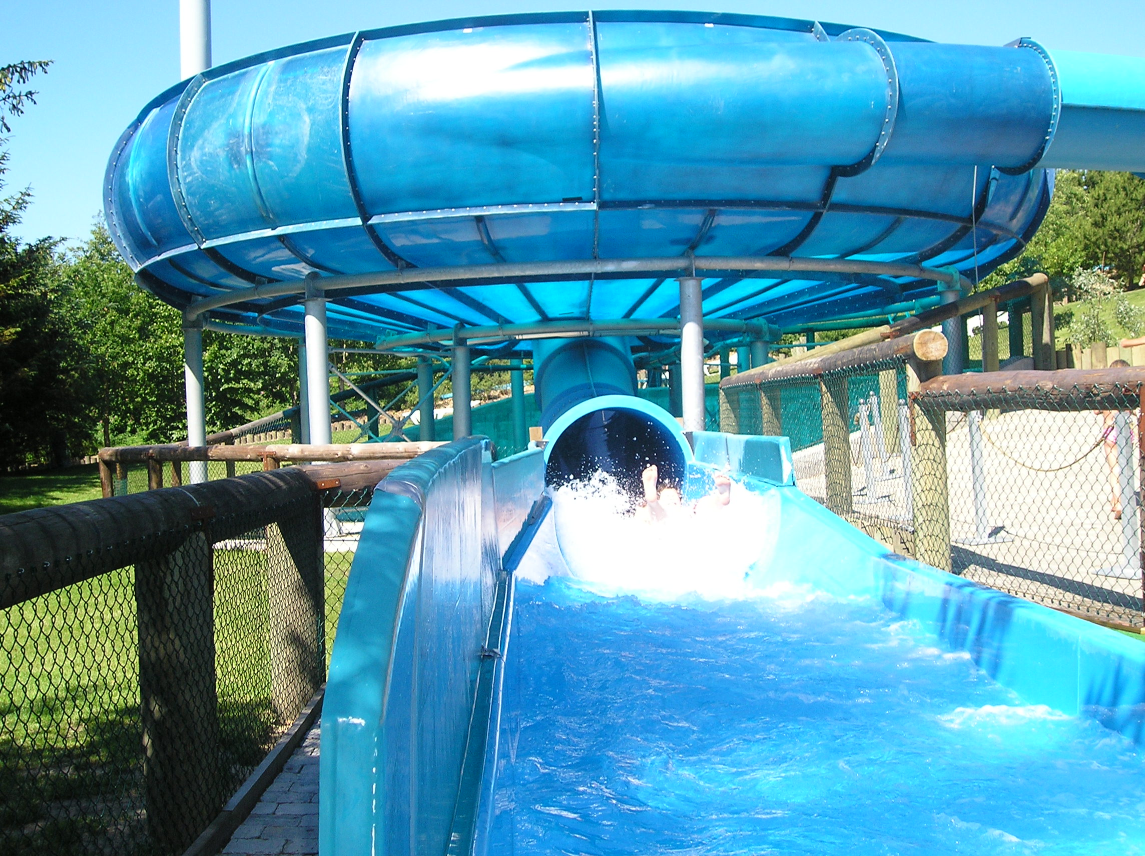 Vandcyklon von unten